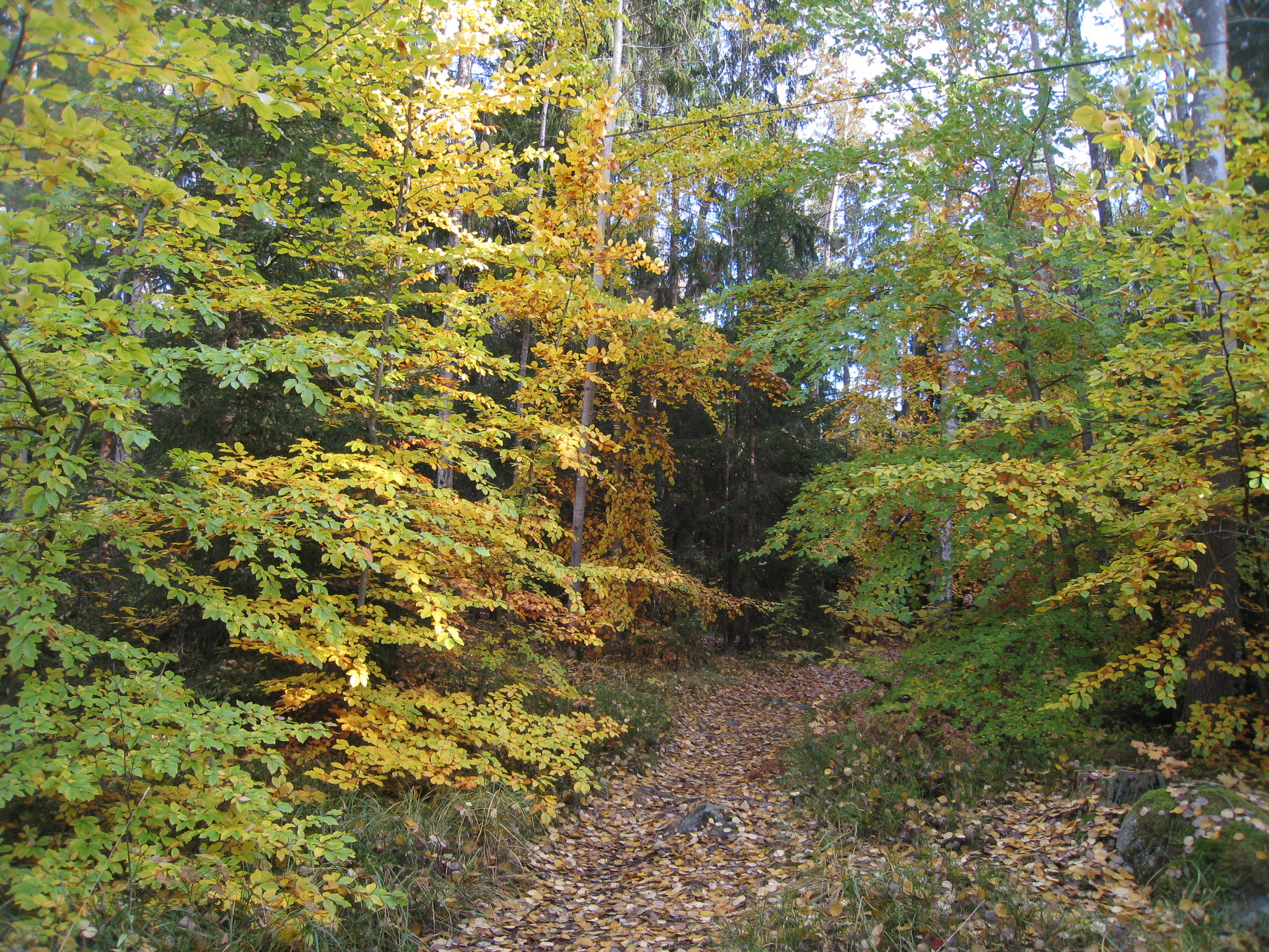 Omgivningen kring Sandviks gård i Görvälns naturreservat, Järfälla kommun, Stockholms län.